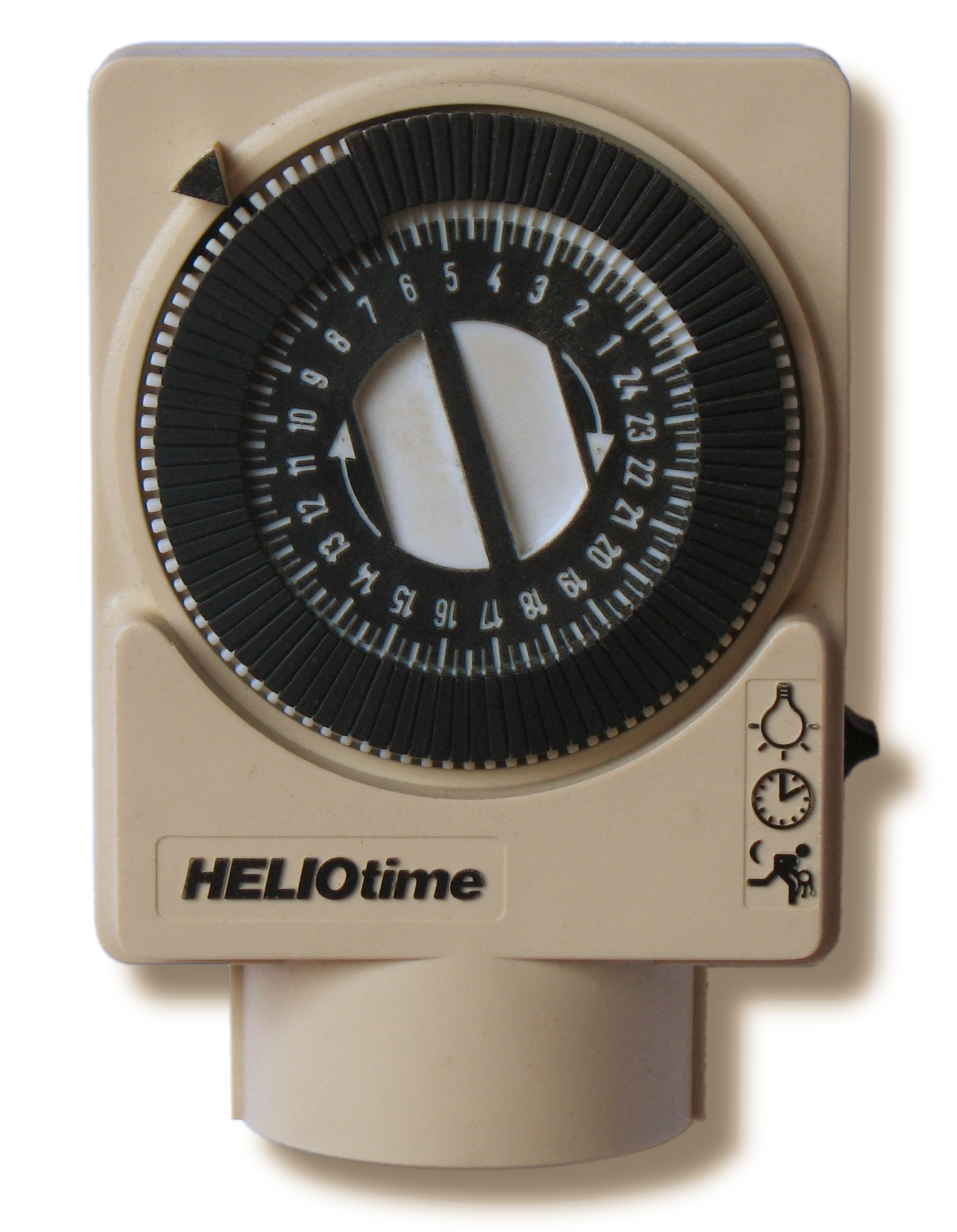 Zeitschaltuhr mit elektromechanischem Schaltwerk